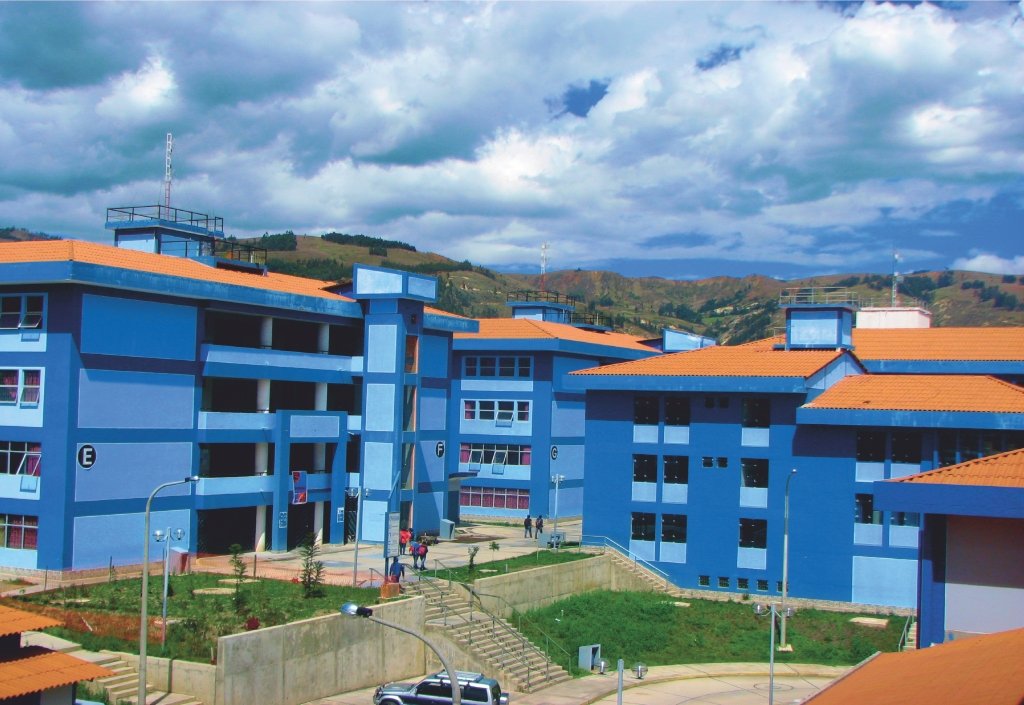 ciudad universitaria de la UNSAM